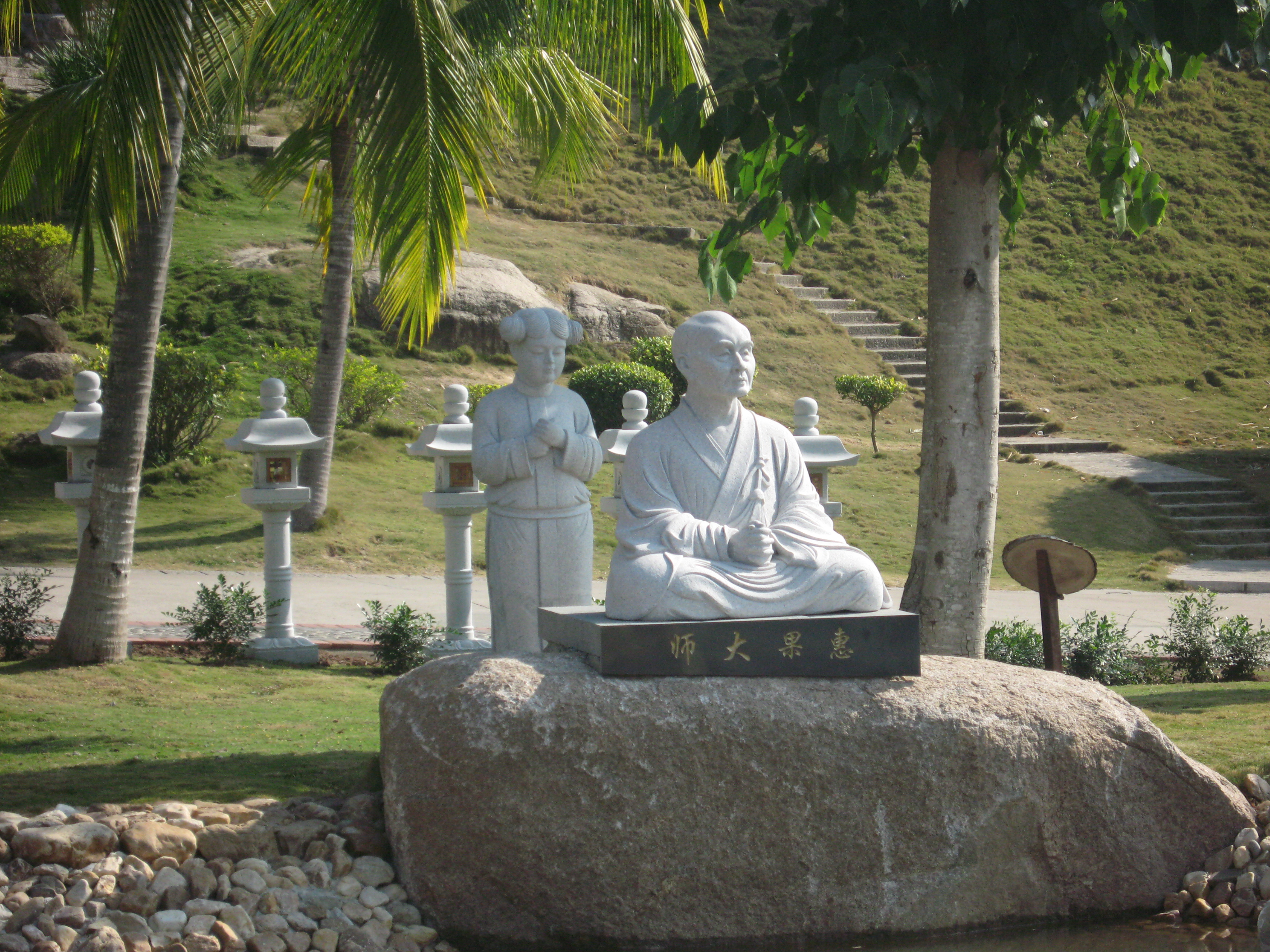 中文（中国大陆）: 惠果大师像